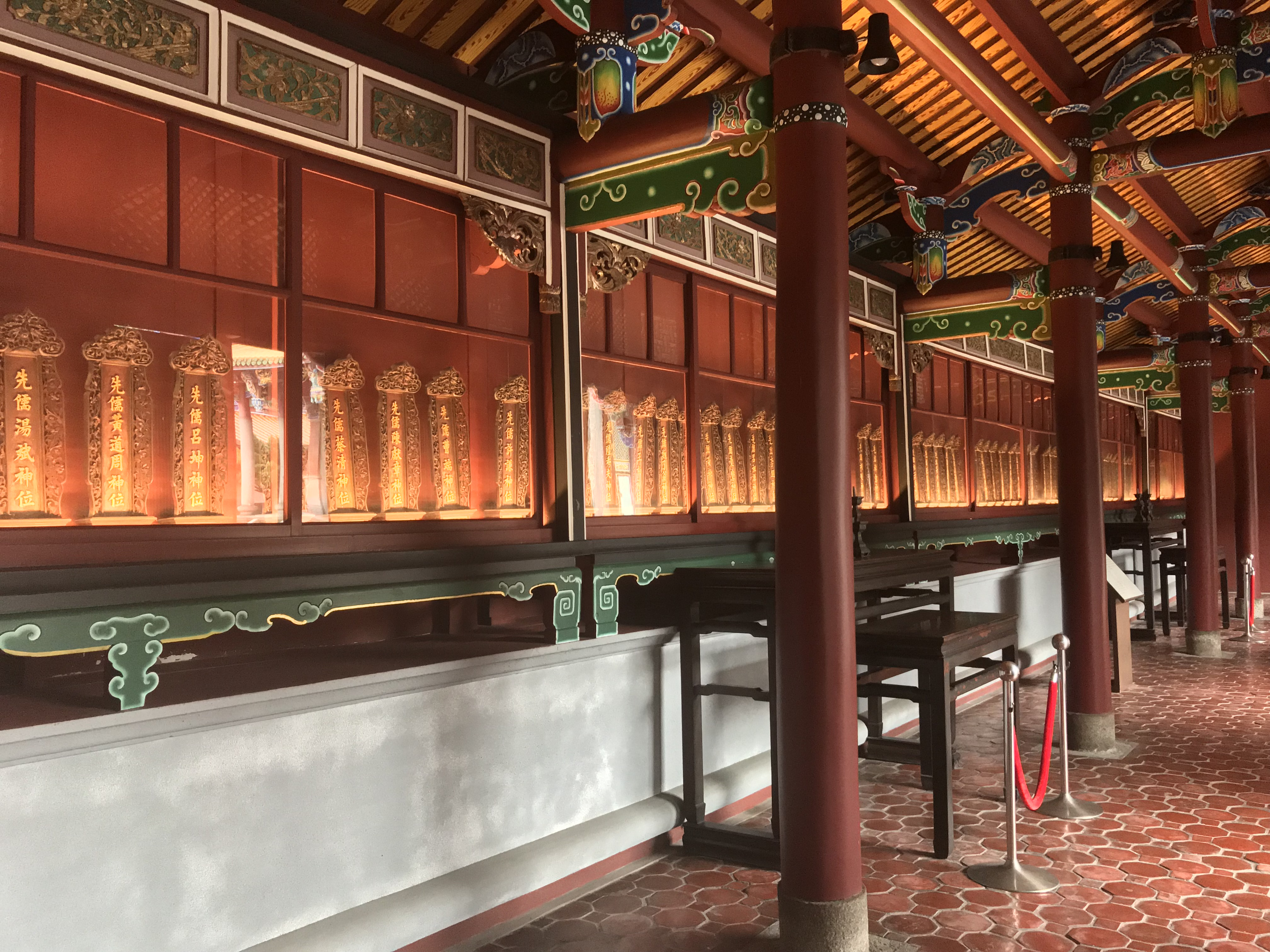 臺北孔子廟西廡內